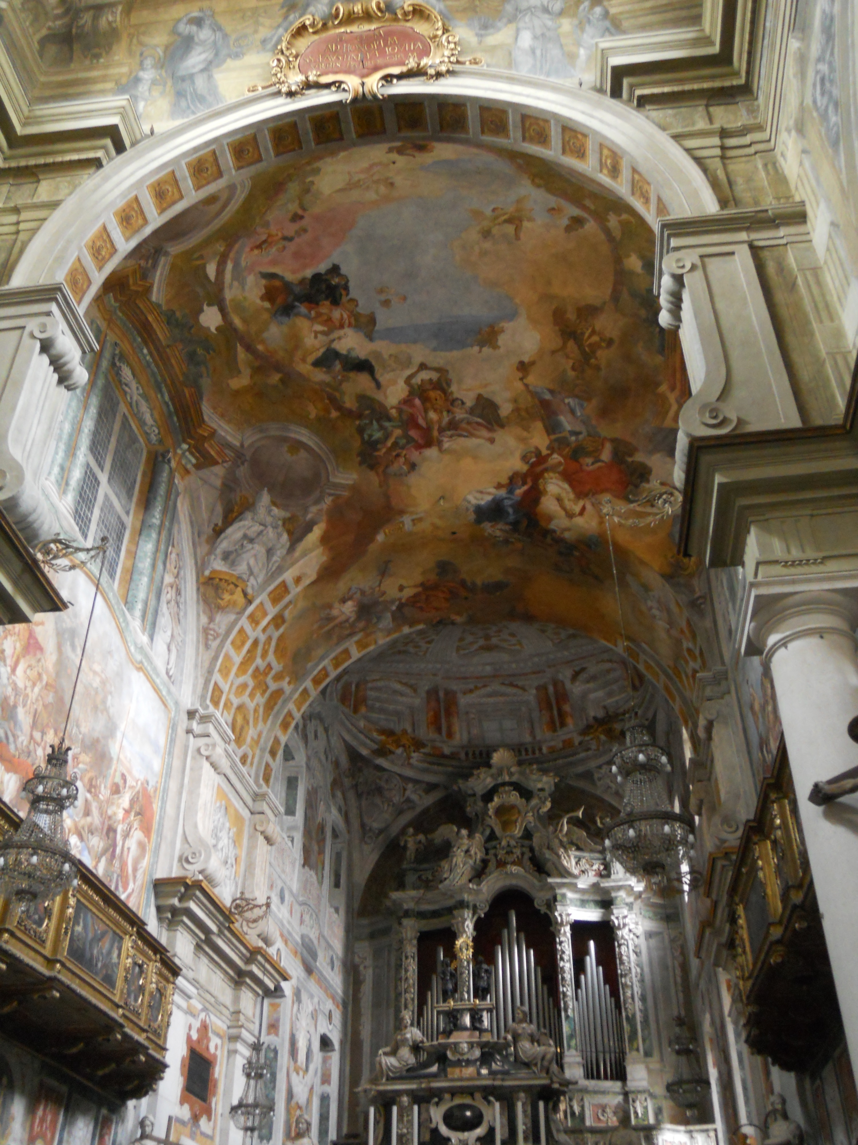 overview